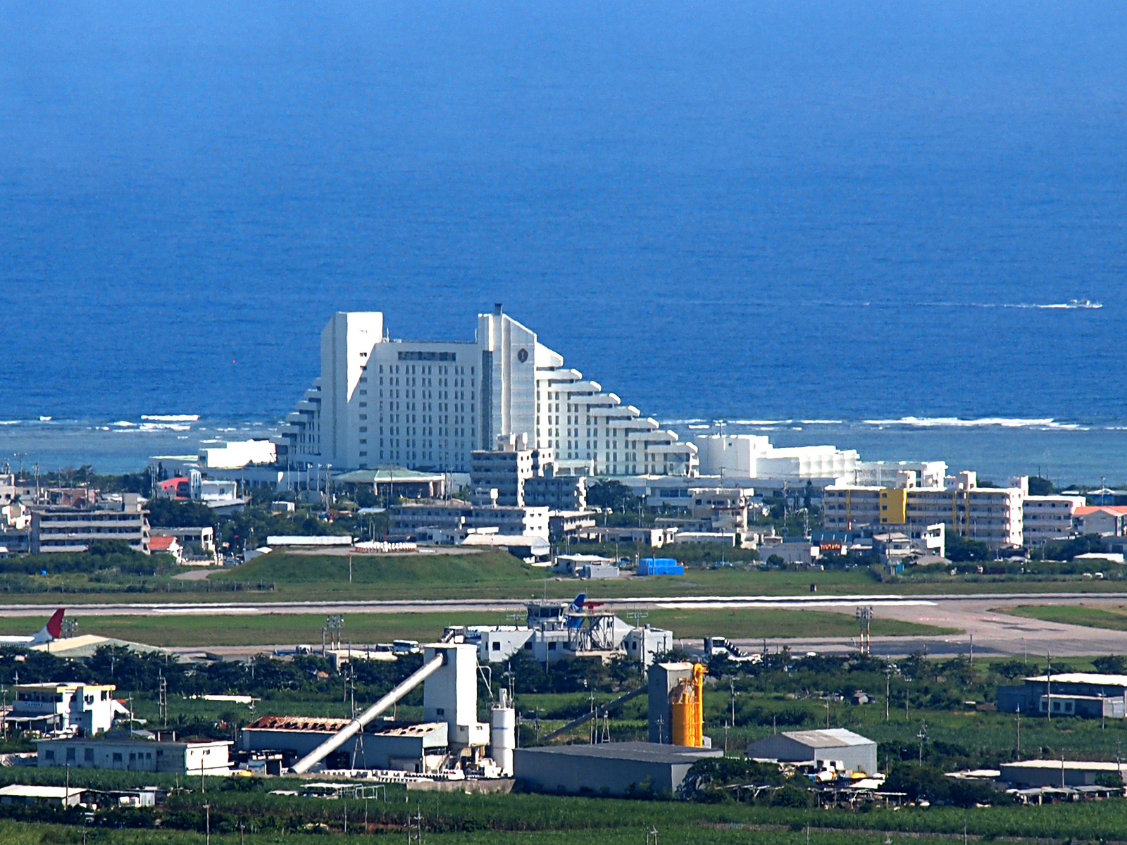 ANAインターコンチネンタル石垣リゾート（沖縄県石垣市）